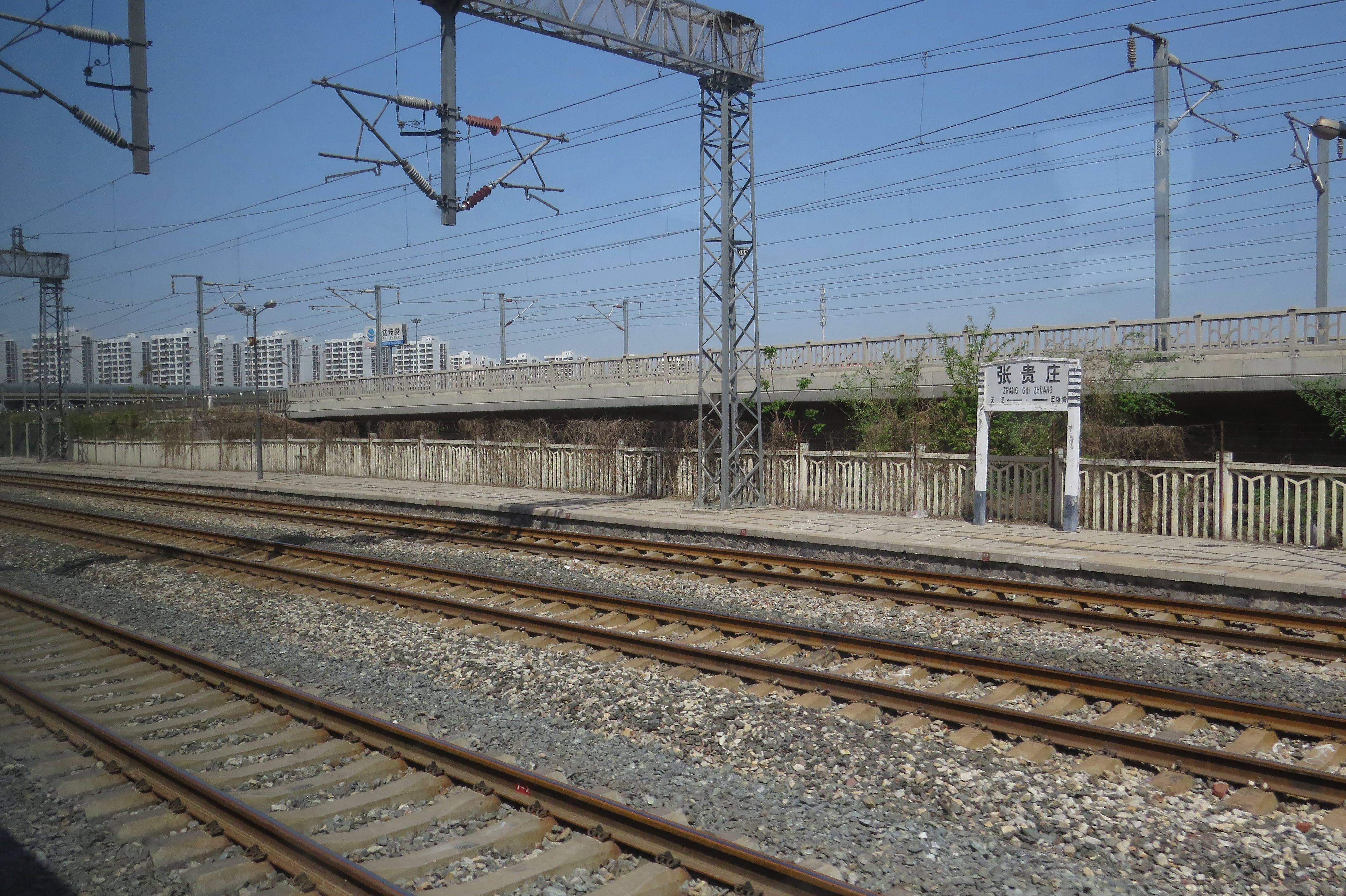 张贵庄火车站